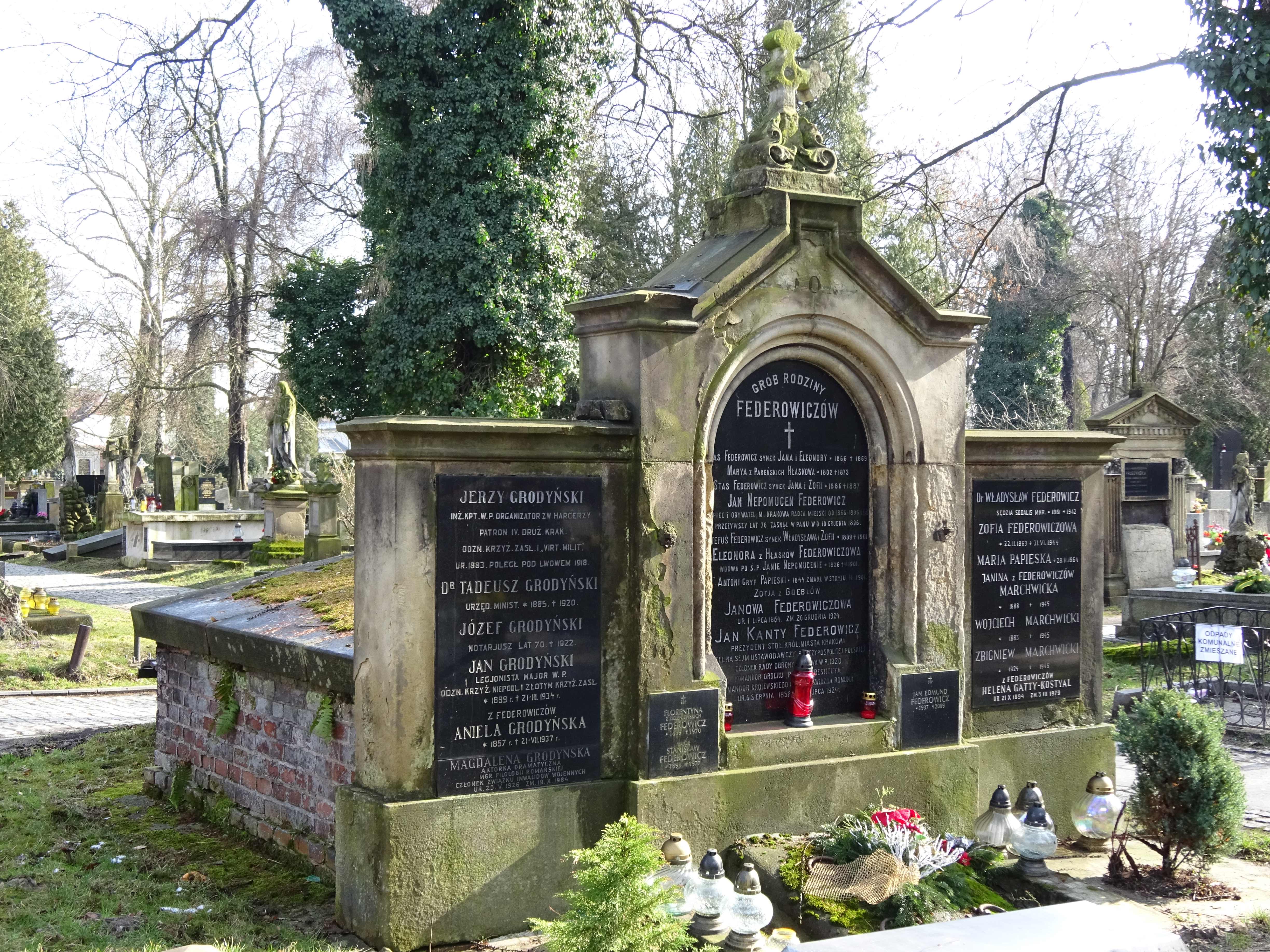 Grobowiec rodzinny Federowiczów na Cmentarzu Rakowickim w Krakowie.